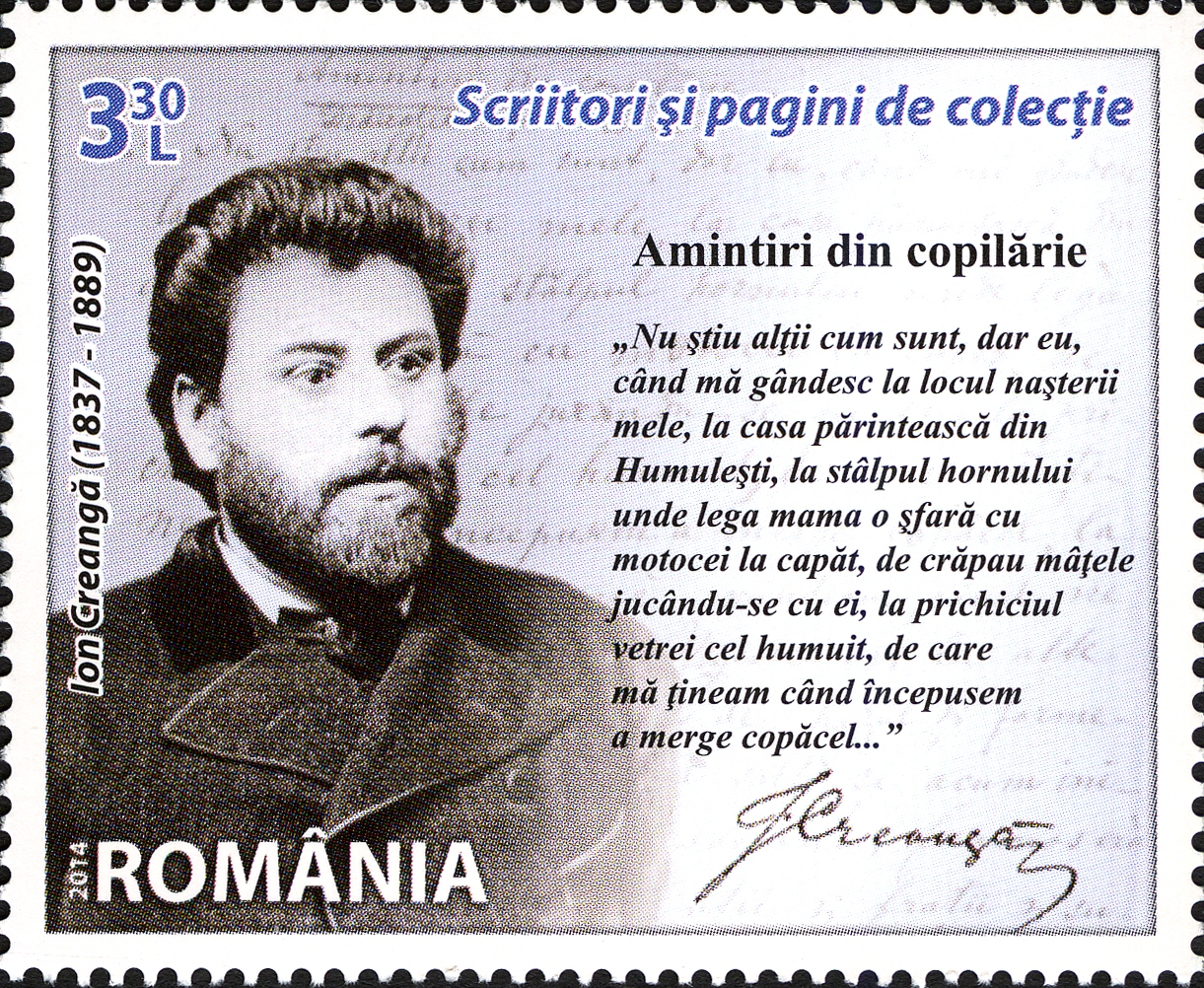 Romanian Writers - Ion Creangă